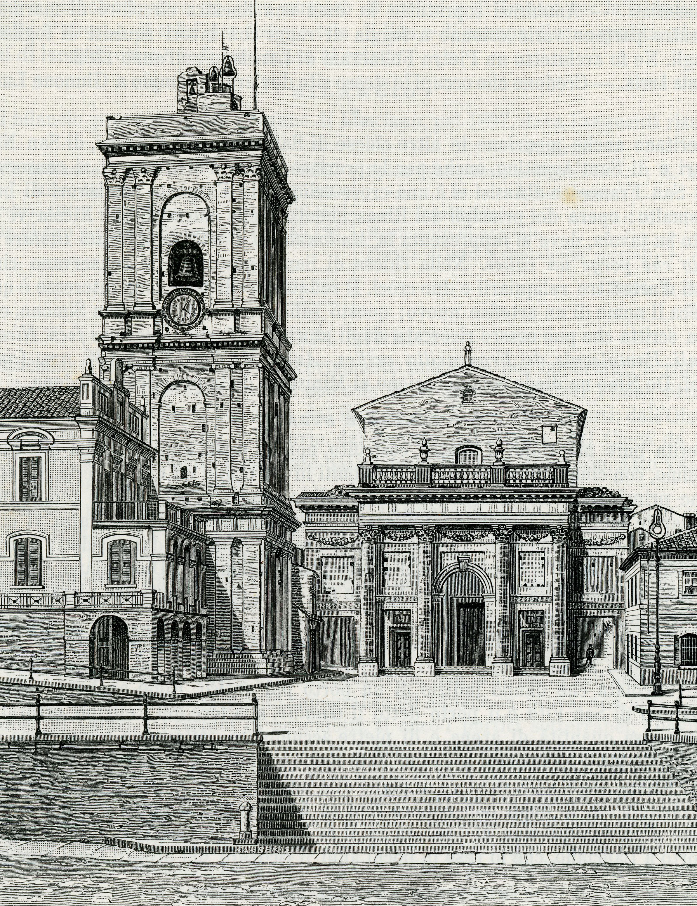 Lanciano: prospetto della cattedrale (xilografia di Barberis 1898).